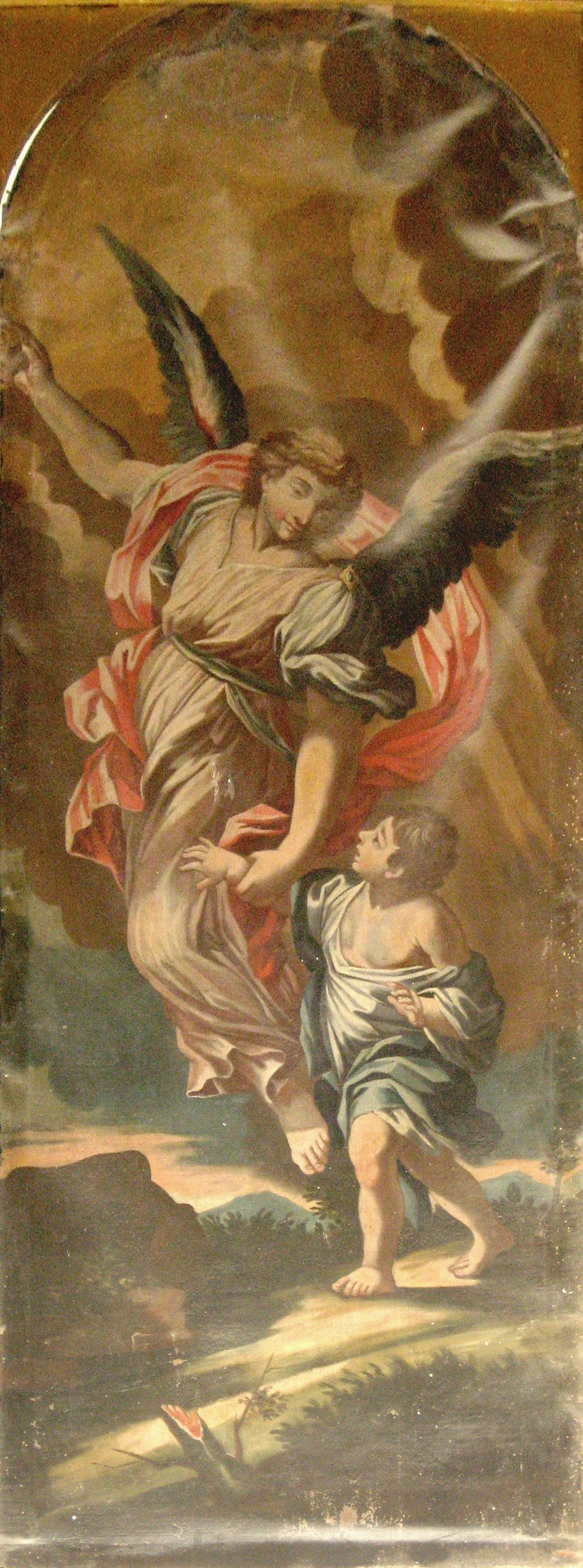 Tela raffigurante San Raffaele.